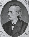 Портрет Адольфа Эберта (1820—1890) — немецкого писателя и филолога-романиста, историка литературы